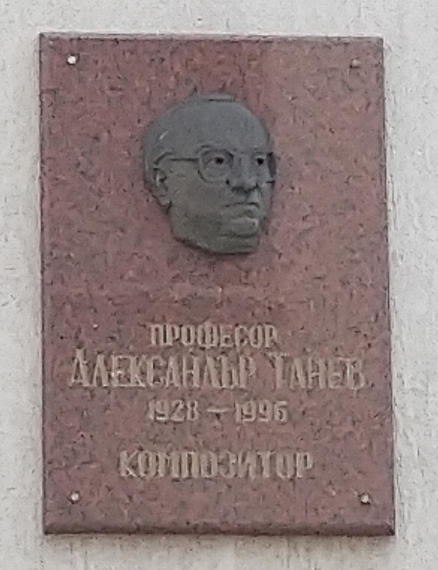 Паметна плоча на композитора Александър Танев